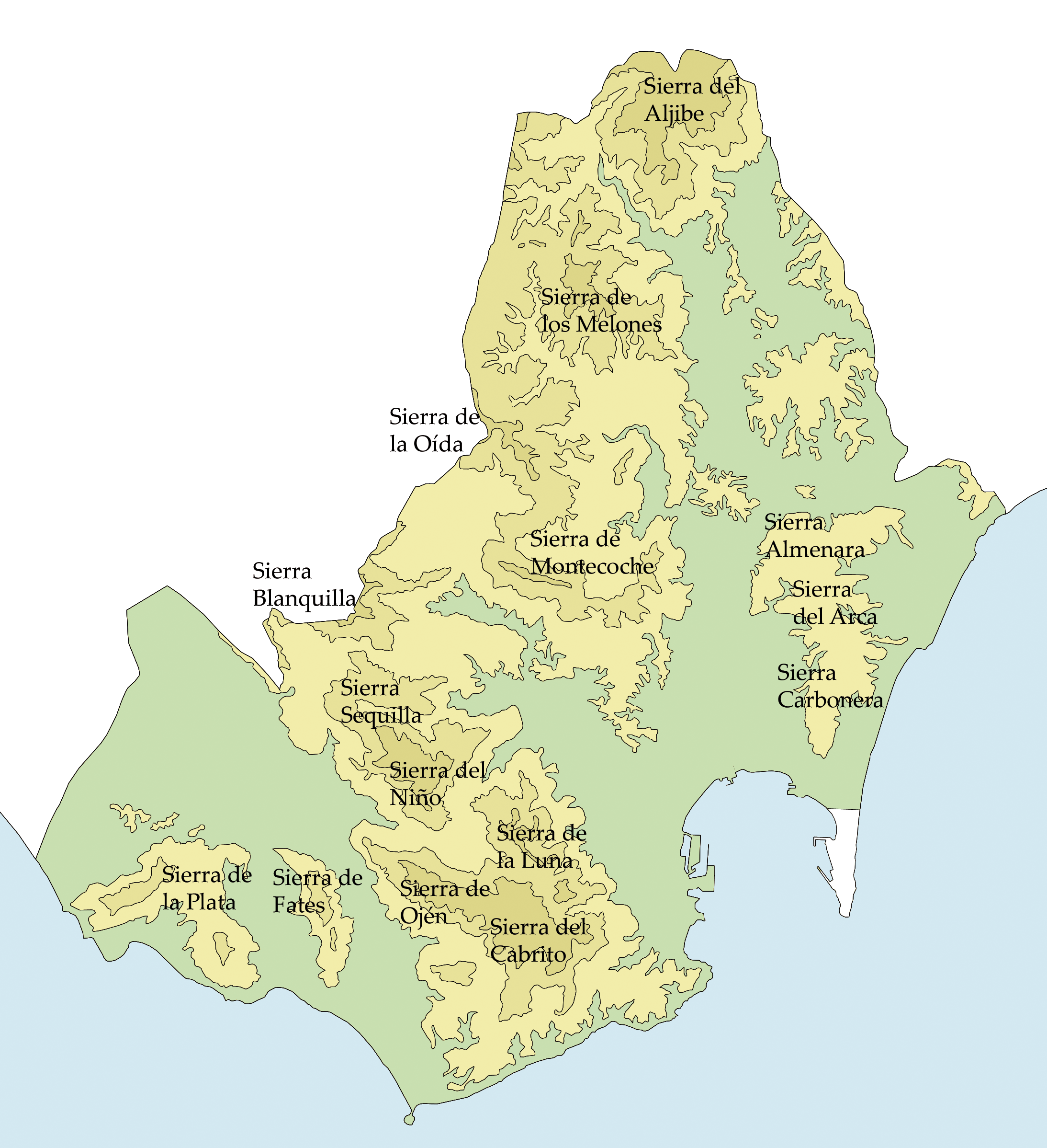 Mapa físico del Campo de Gibraltar, Andalucía, España.